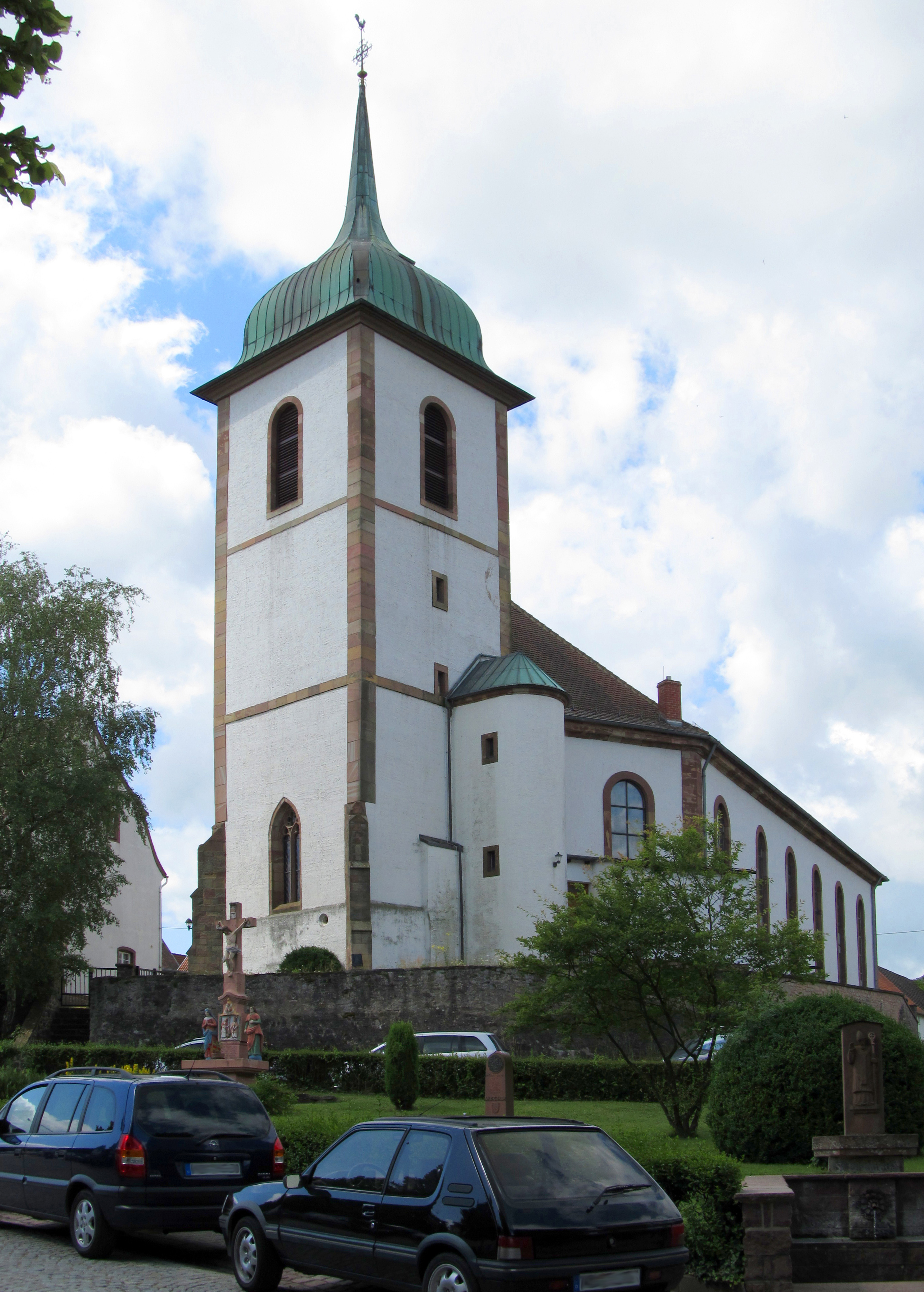 Die katholische Pfarrkirche St. Martin in Medelsheim, Saarland